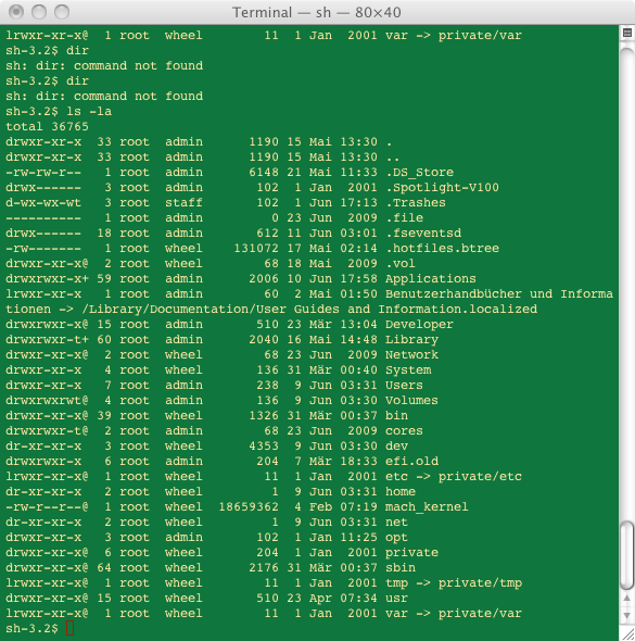 Unix-Prompt